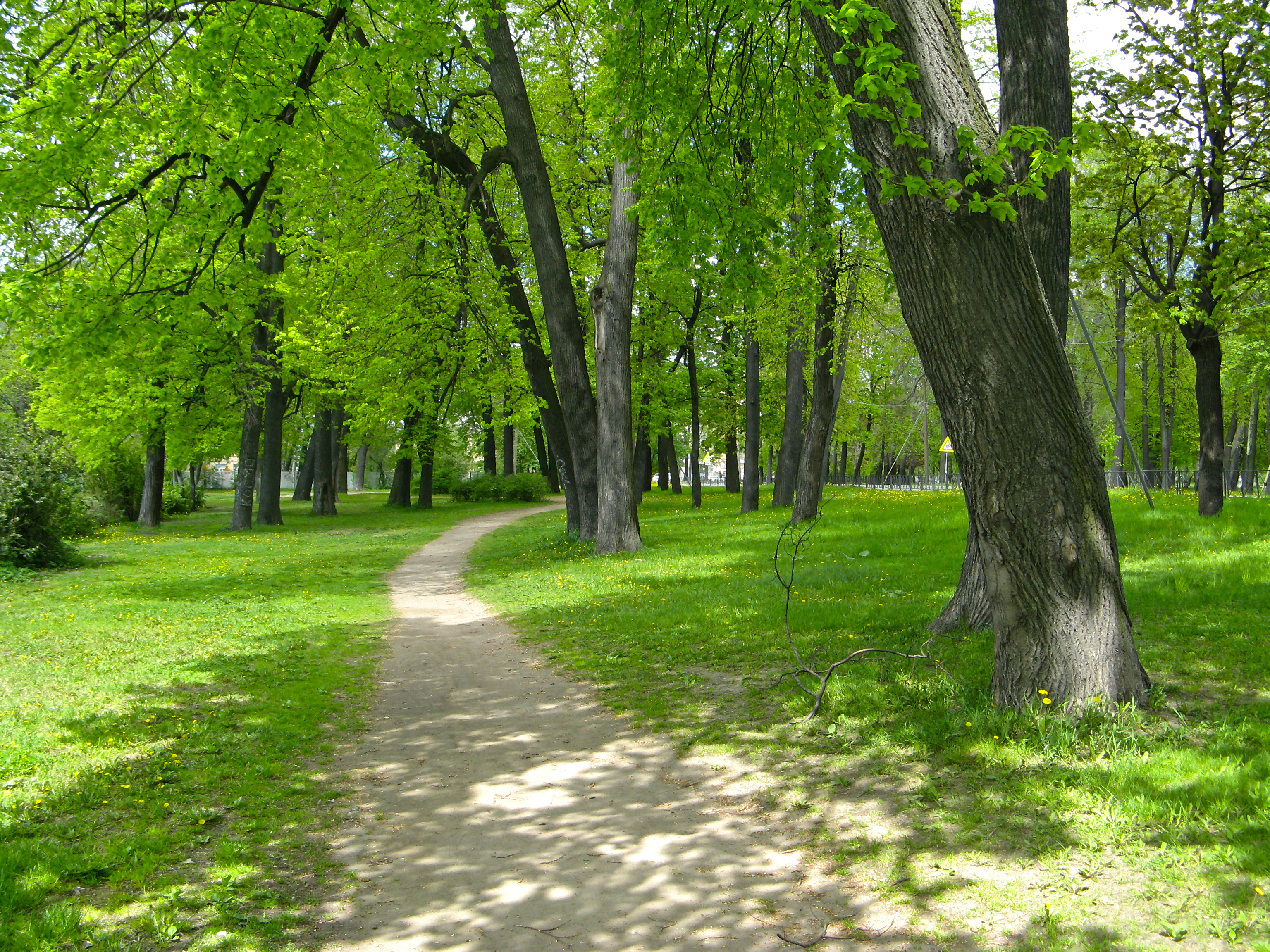 Петровский парк: Петровский проспект - по обе стороны, от р. Ждановки до Петровского пруда, Петроградский район, Санкт-Петербург